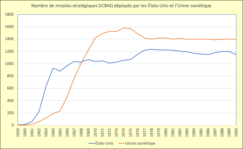 Nombre d'ICBMs déployés par les États-Unis et l'URSS durant la guerre froide - Données par année Sources : Pour les États-Unis : Strategic Air Command Pour l'URSS : The Kremlin's Nuclear Sword, 1945-2000, par Steven J. Zaloga, publié en 2002